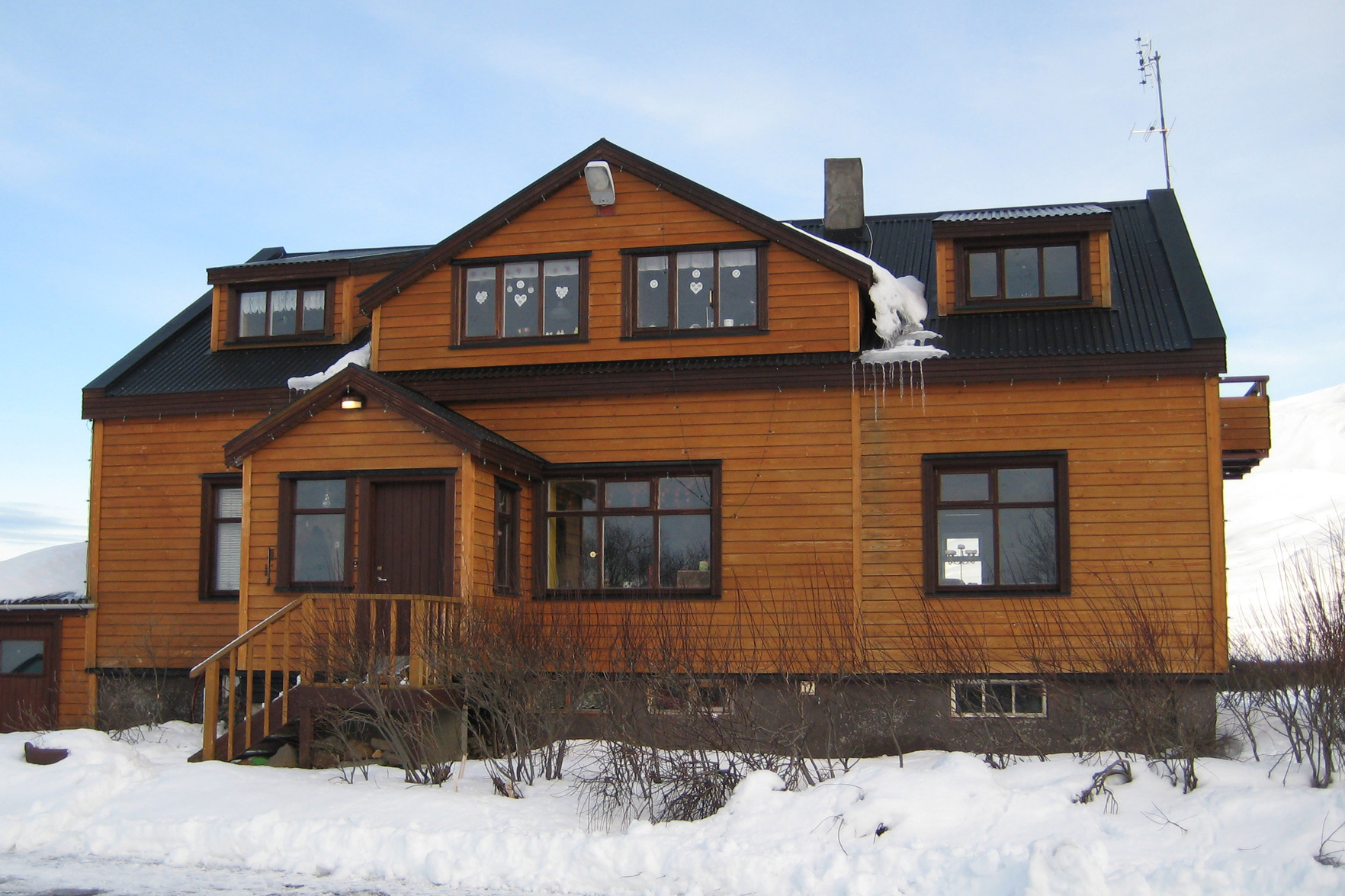 Tjörn í Svarfaðardal (N-Iceland)